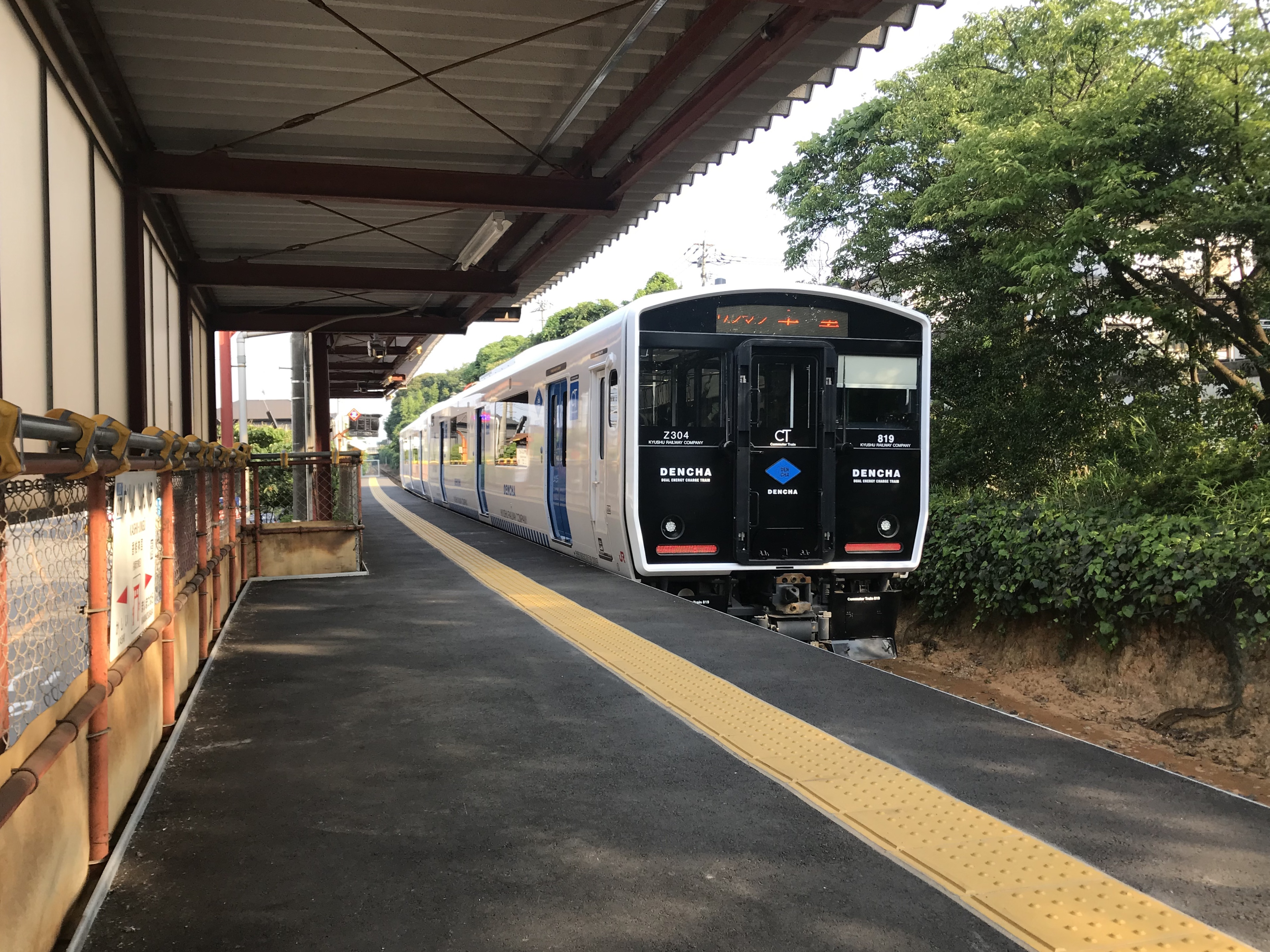 香椎神宮駅のホームと宇美行き香椎線列車(奥は舞松原方面)